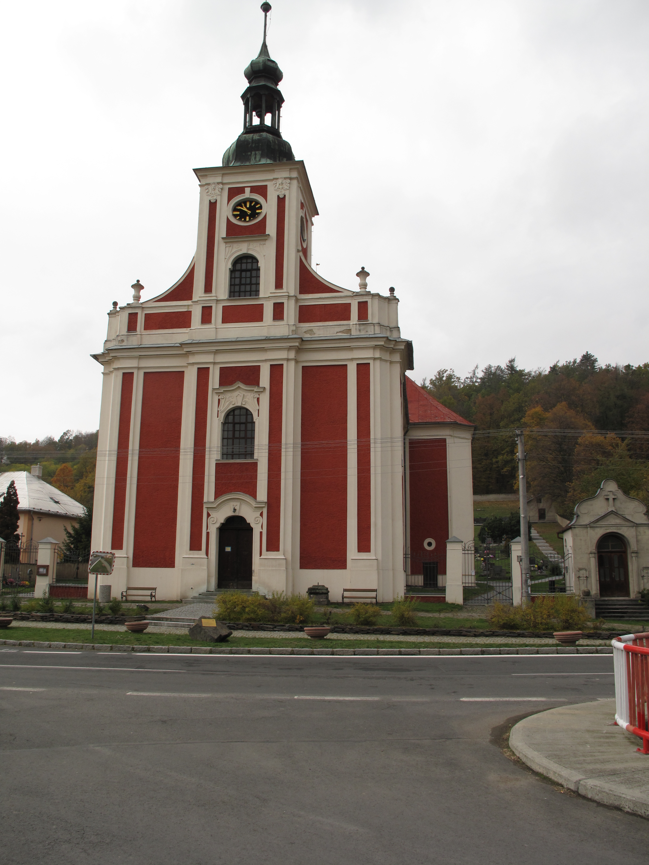 Lichnov (okres Bruntál). Okres Bruntál, Česká republika.